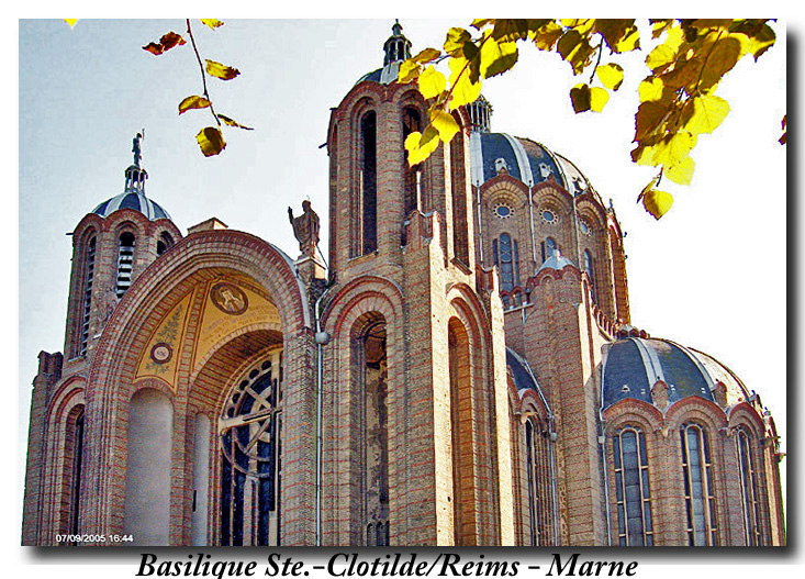 fronton